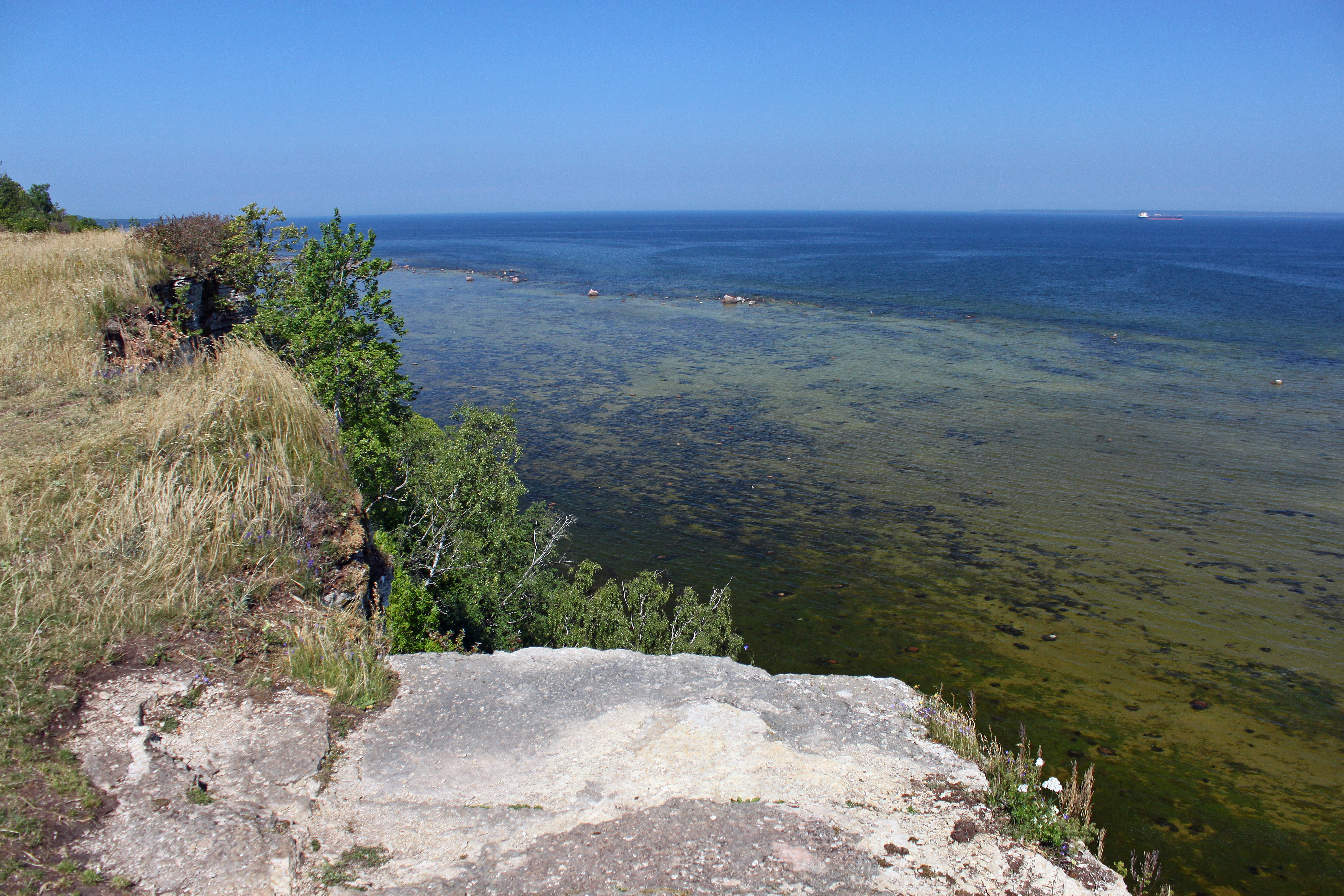 Обрыв Табасалу, Эстония